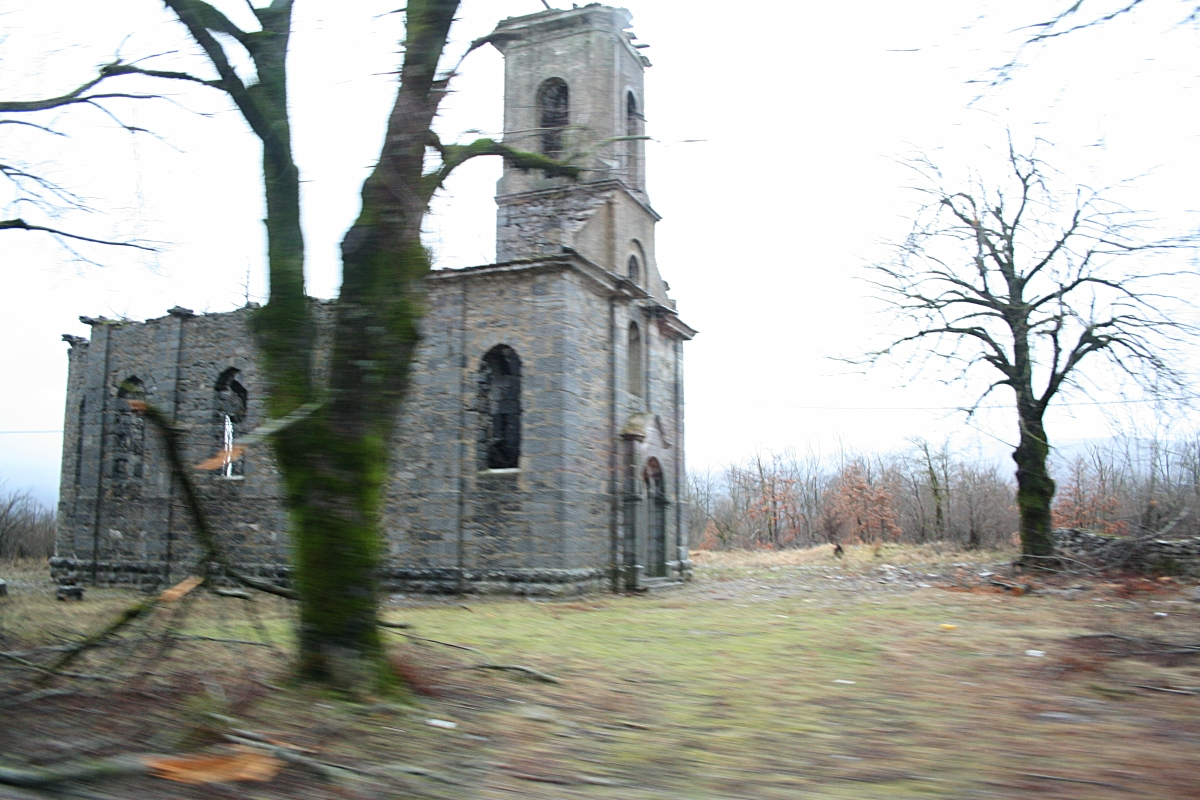 Zagreb_Split